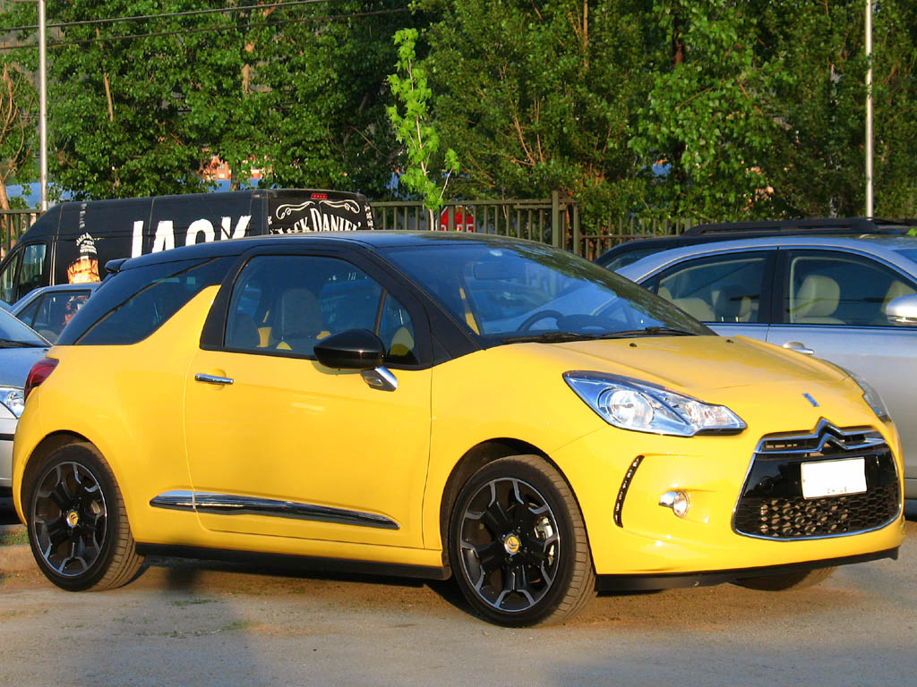 Citroen DS3 2011